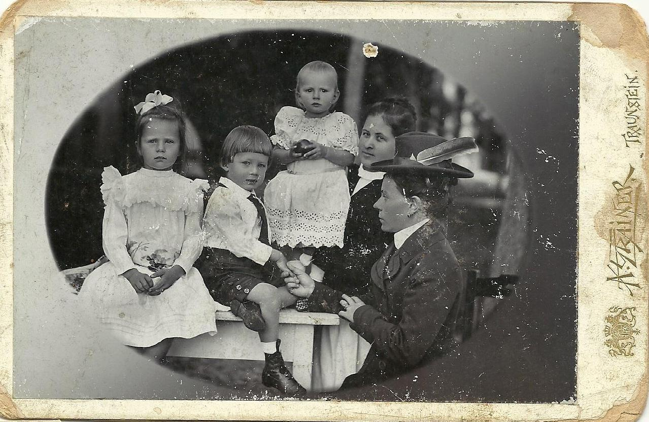 Фотография семьи герцога Лейхтенбергского Георгия Николаевича